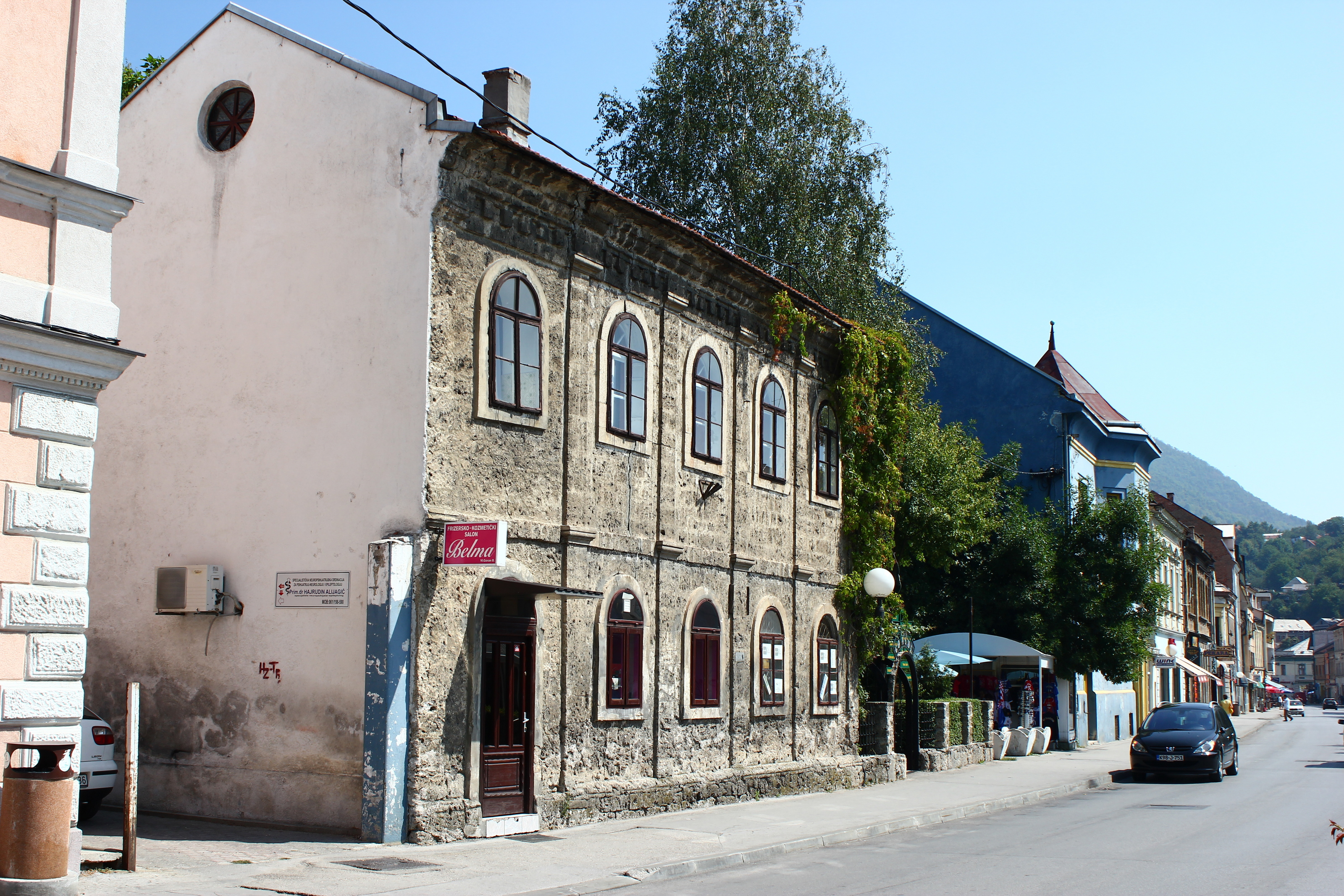 Das Gebäude des ehemaligen österreichisch-ungarischen Konsulats in der Altstadt von Travnik.